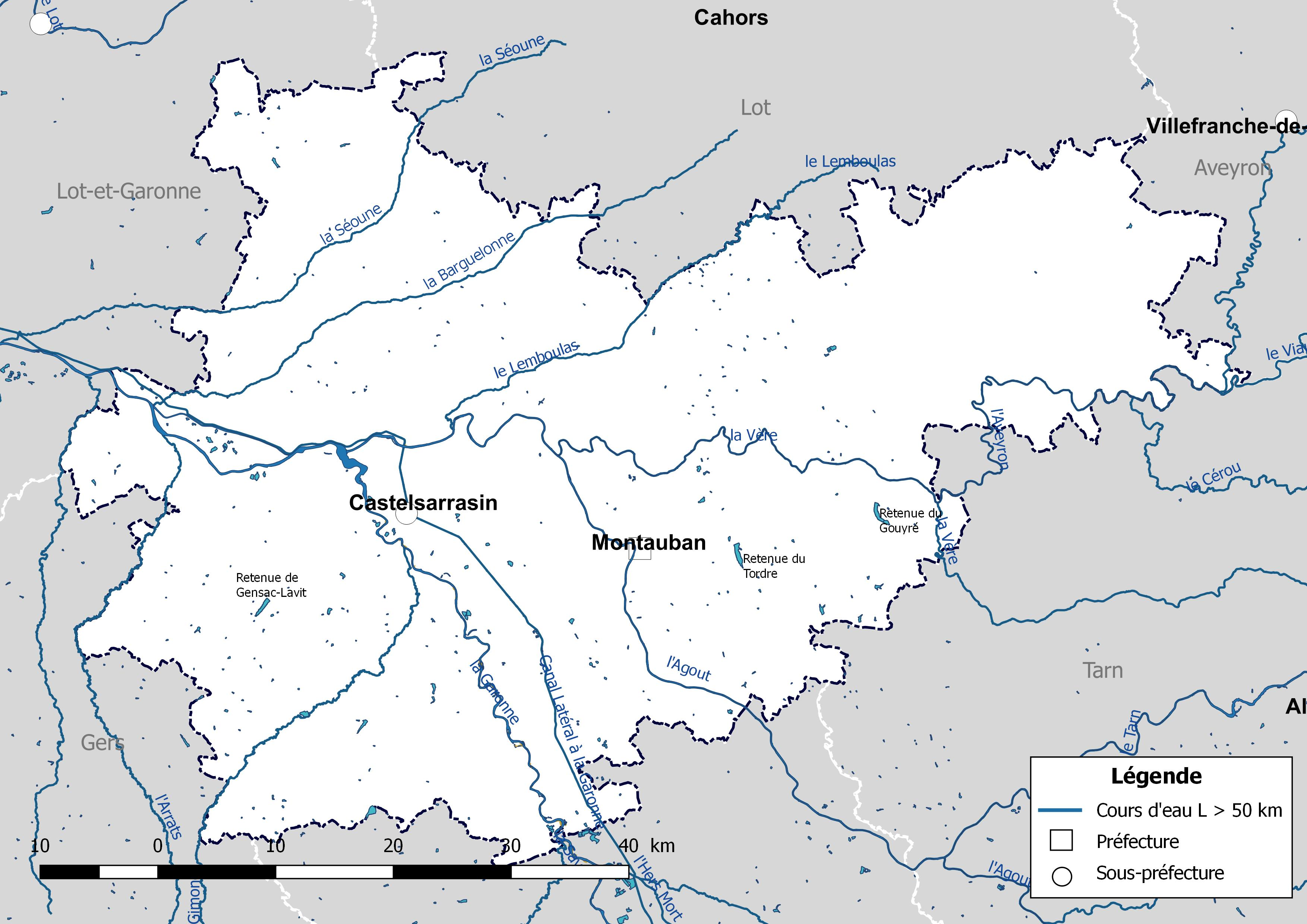 Carte des cours d'eau de longueur supérieure à 50 km drainant le département de Tarn-et-Garonne (France).